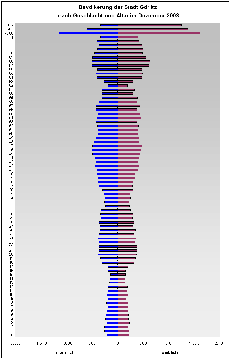 Bevölkerungspyramide der Stadt Görlitz aus dem Jahr 2008 (Quelle: Stadtverwaltung Görlitz, Kommunale Statistikstelle (Hrsg.): Statistisches Jahrbuch 2009. Stadtverwaltung Görlitz, Zentrale Kopierstelle, 2009.)